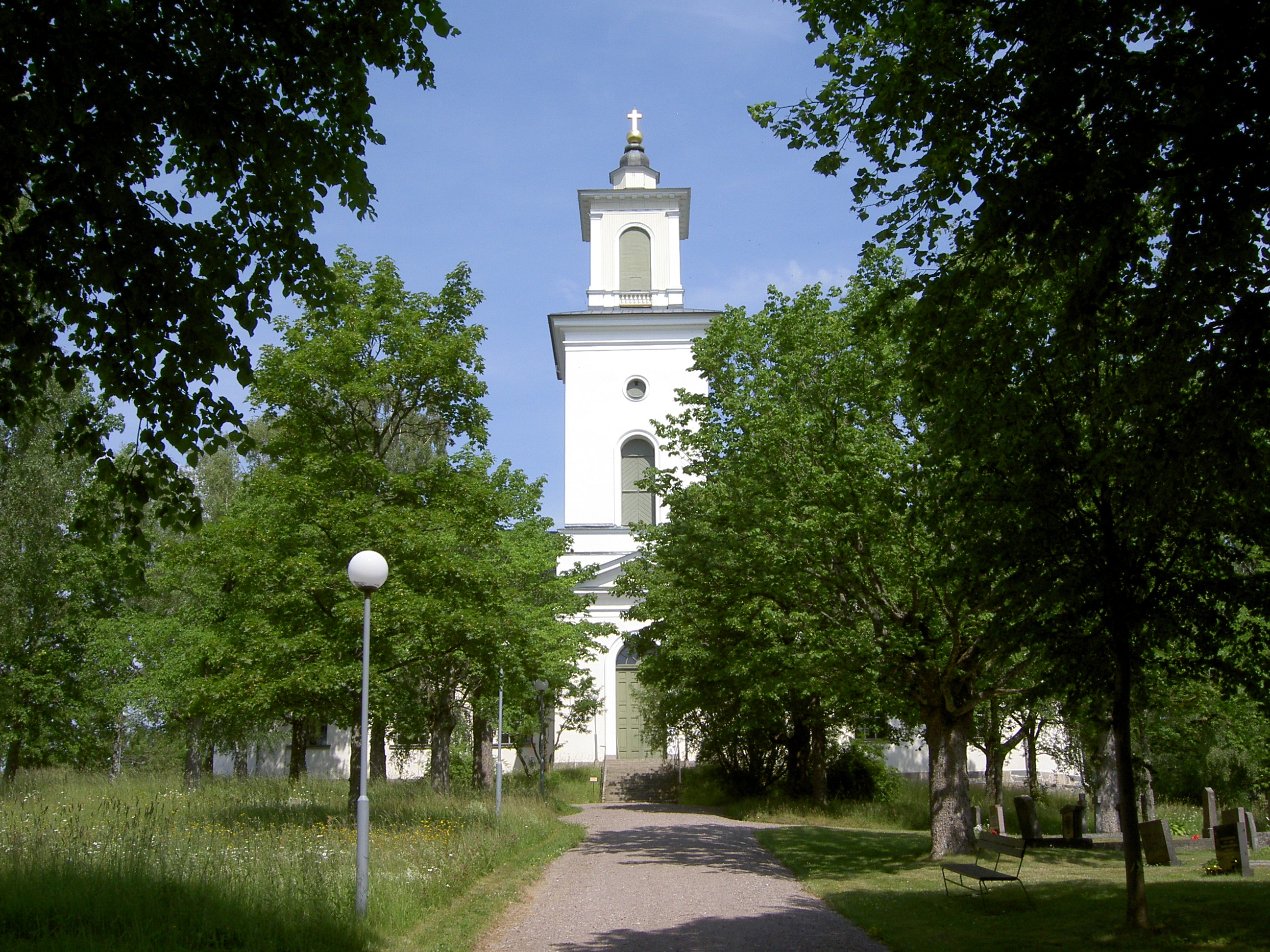 Tösse nya kyrka